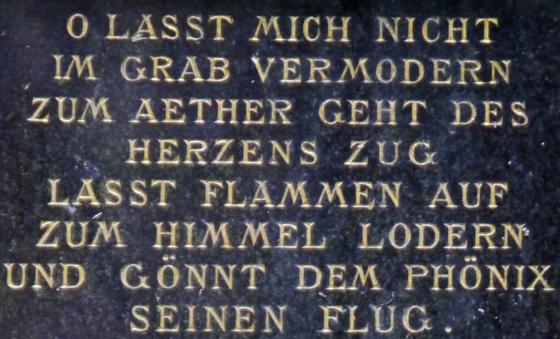 Grabinschrift auf deinem Urnenhain, 2016 auf dem Hauptfriedhof in Frankfurt am Main. Sterbedaten Mann: 1913, Frau: 1936